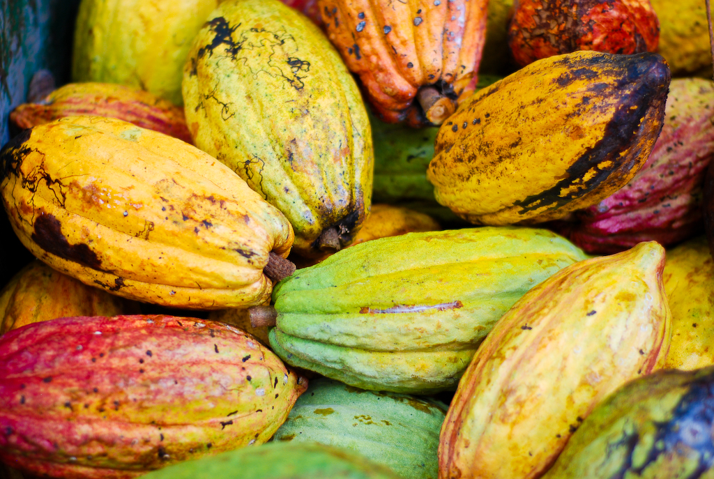 Cacao de Costa Rica, en Limón.